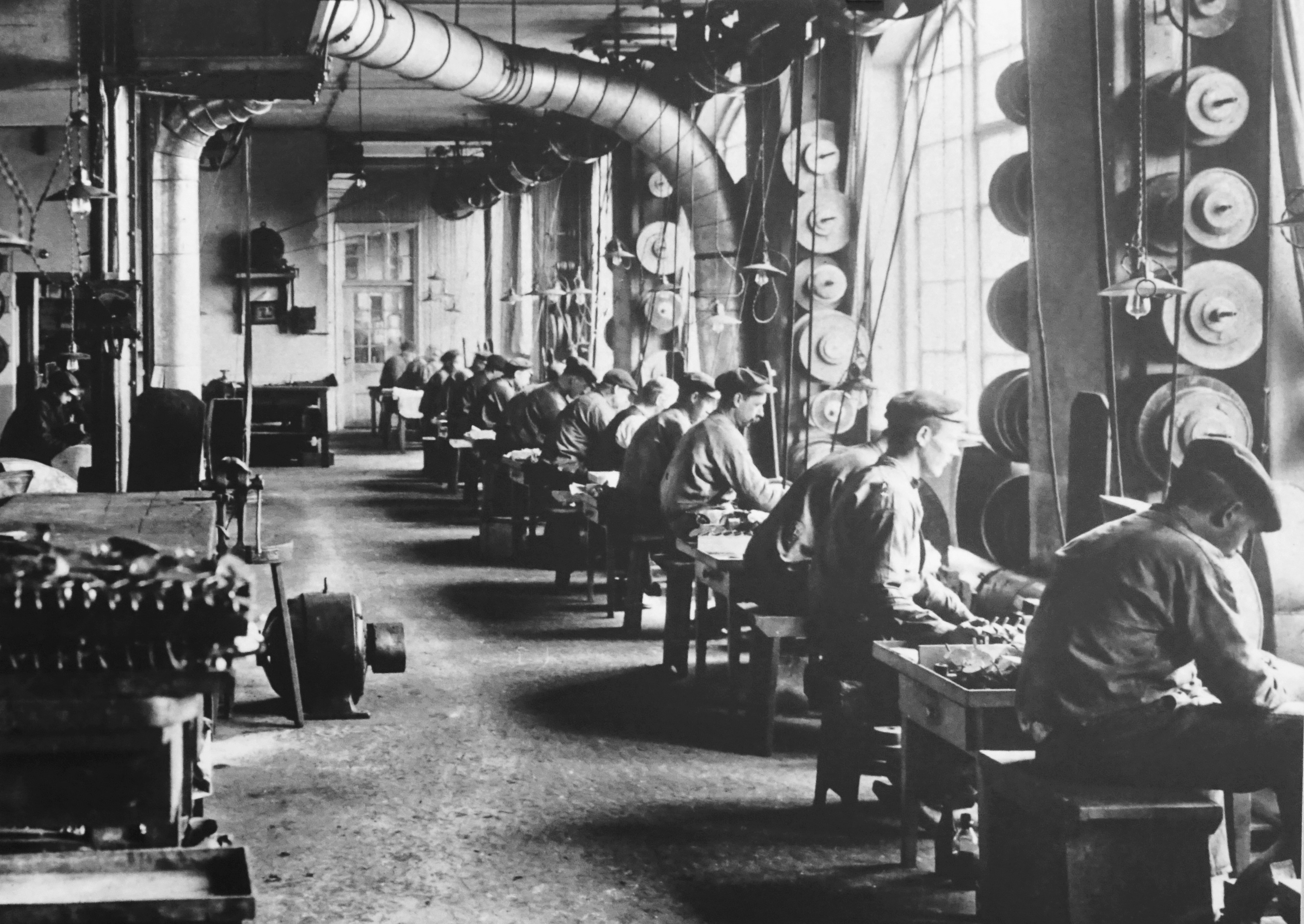 Interiör, Stille-Werners fabrik på Södermalm (Svartensgatan)